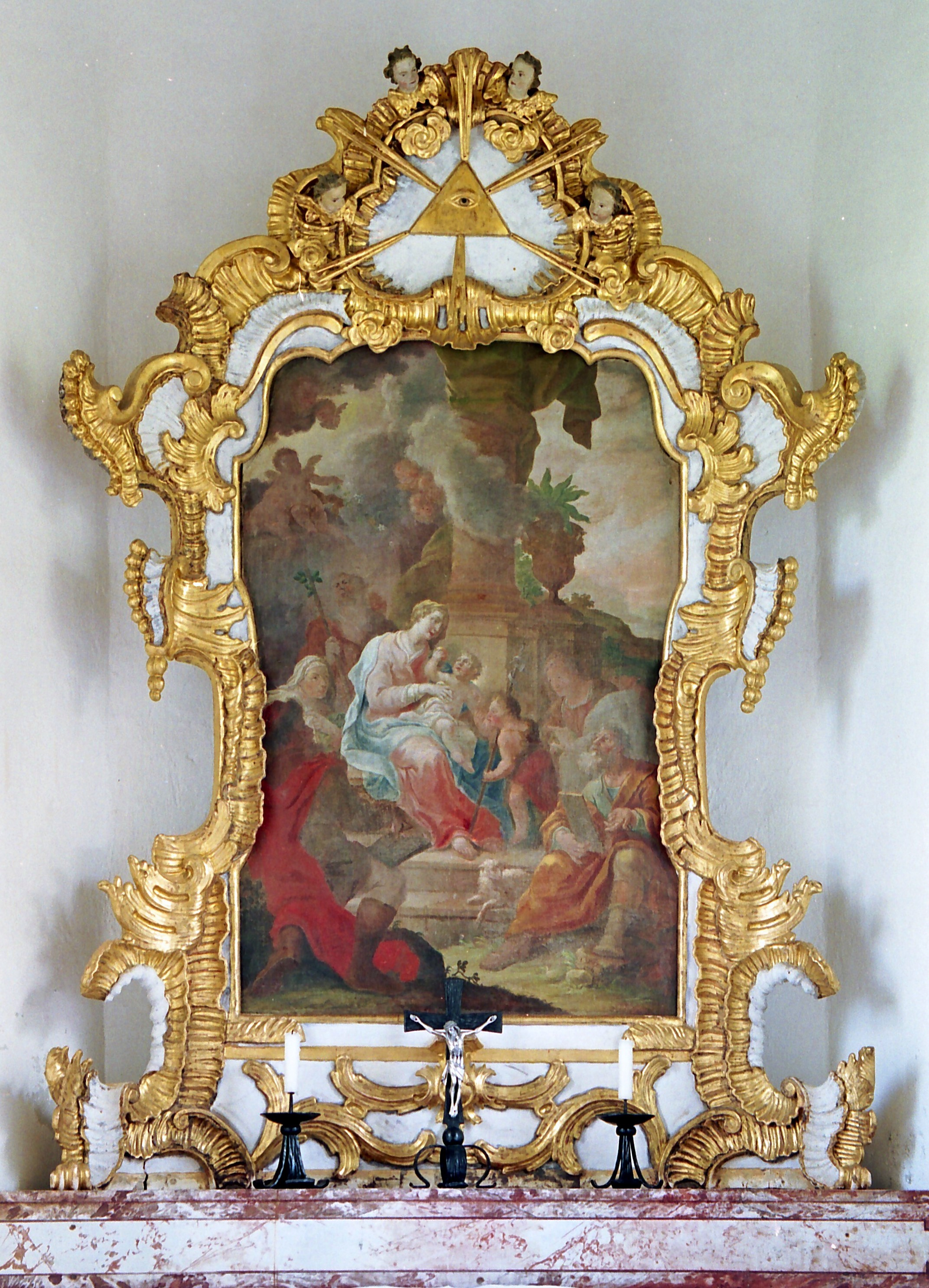 Altaraufabau der Kapelle Maria Trost bei Unterhingau, um 1760